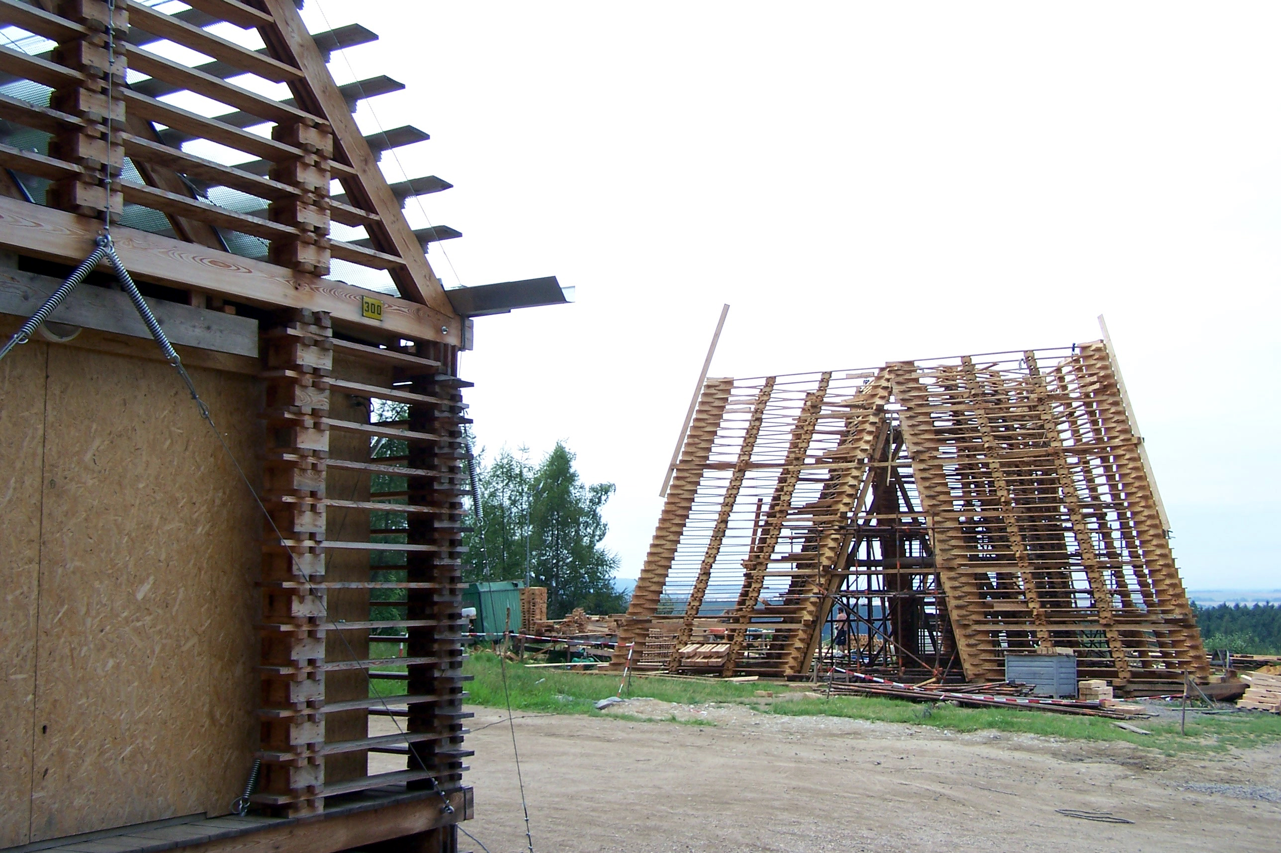 Česky: Rozhledna Bára. Loc: 49°54'58.672"N, 15°46'50.306"E